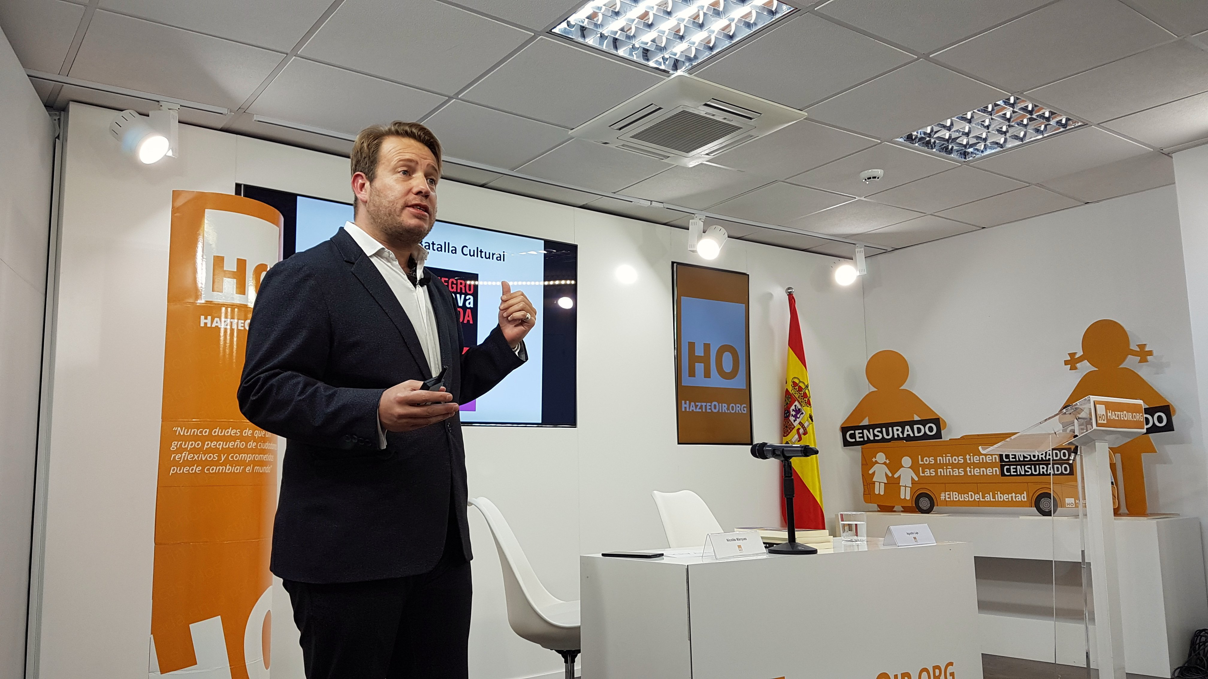 2018.11.06 Conferencia de Nicolás Márquez y Agustin Laje en Madrid